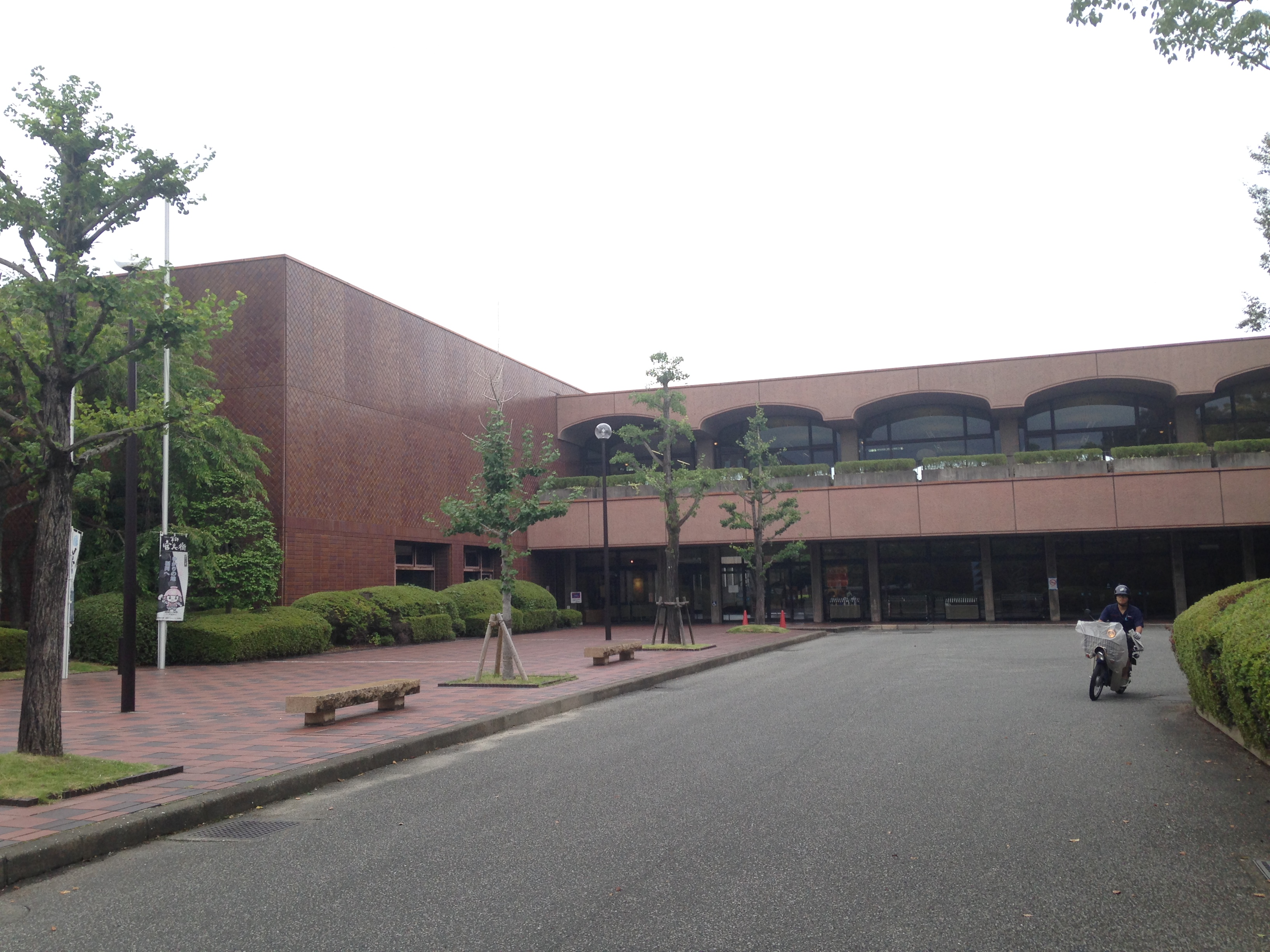 福岡市美術館